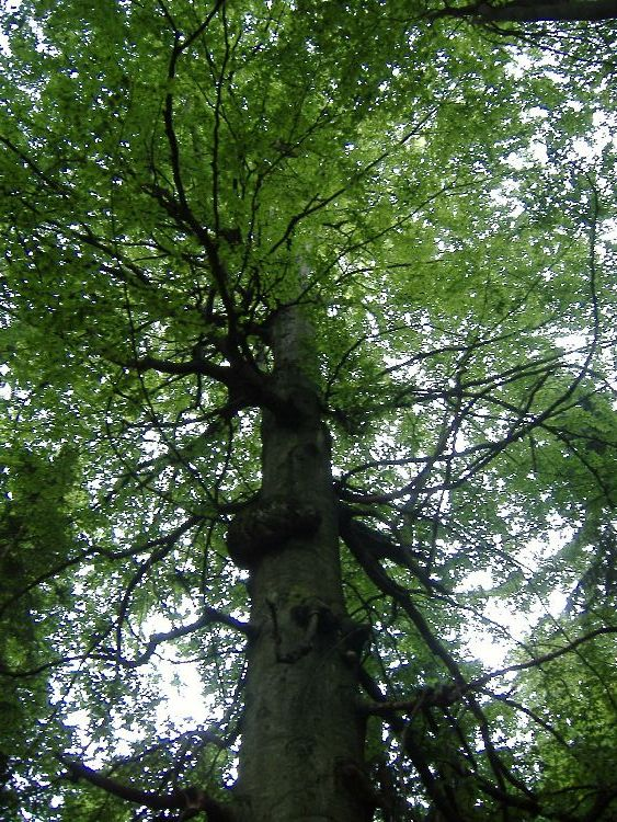 Buk lesní